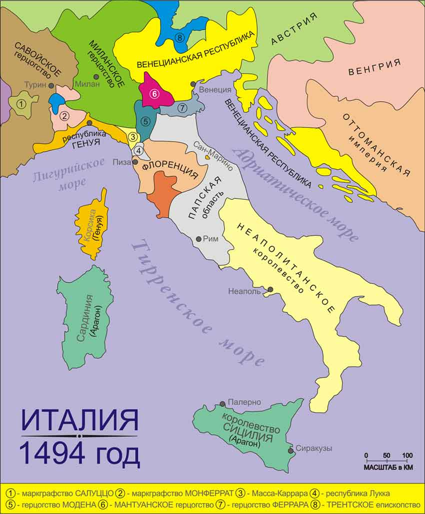 карта государств Аппенинского полуострова в 1494 году